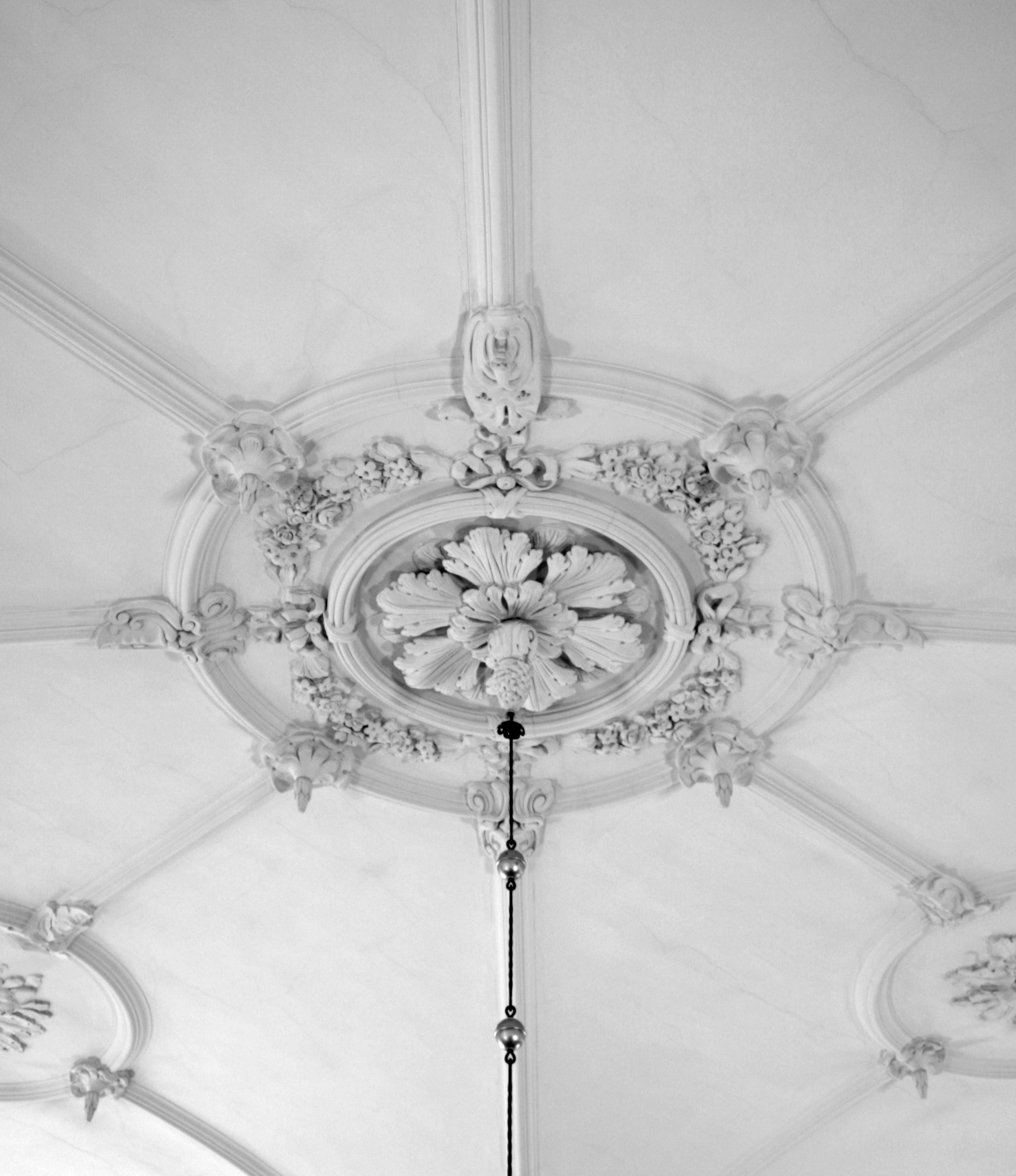 Holmens Kirke, Copenhagen, Denmark . Loftsdekoration. Blomsterrosetten i korsskæringen.